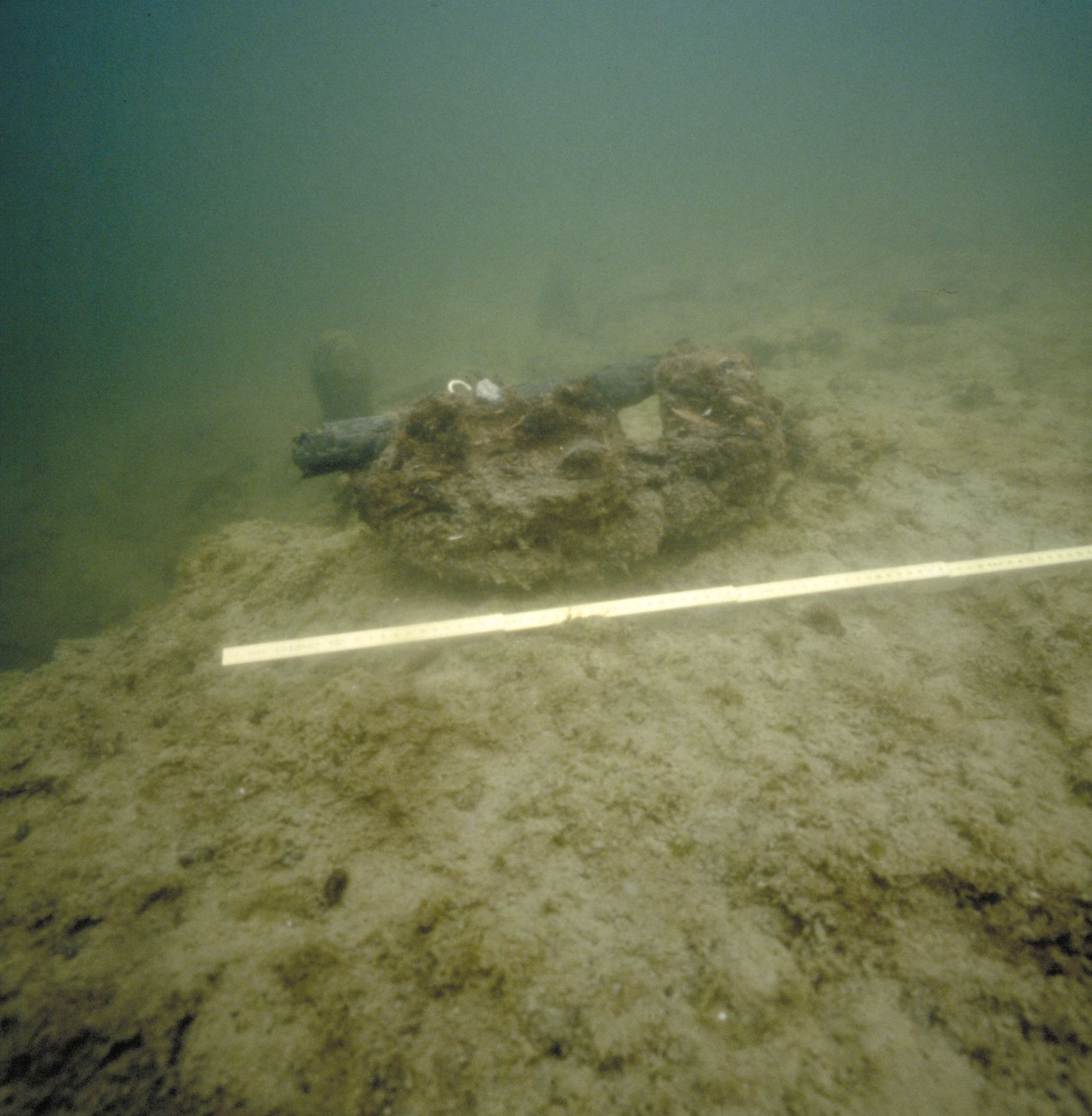 Bildarchiv der Kantonsarchäologie Aargau Kürzel/FotoNr.: Msw.96.2.6, Archiv Nr. Col./Dig.: 25363, Photo CD Nr Color: 252/58, Objekt: Seeufersiedlung Lage: Meisterschwanden, Erlenhölzli Aufnahmejahr: 1996 Beschreibung: Unterwasseraufnahme: Erosionskante mit herausgebrochenem Kulturschichtblock von Südost Ausgrabung: In Zusammenarbeit mit der Tauchequipe der Stadt Zürich wurde im April 1996 das gesamte Ufer des Hallwilersees abgeschwommen und eine Kurzbestandesaufnahme der archäologischen Funde und Befunde gemacht. Die Aktion sollte zur Abklärung des Zustandes der bisher bekannten Seeufersiedlungen beitragen. Datierung Befund: Jungsteinzeit (4. bis 3. Jt. v. Chr.)